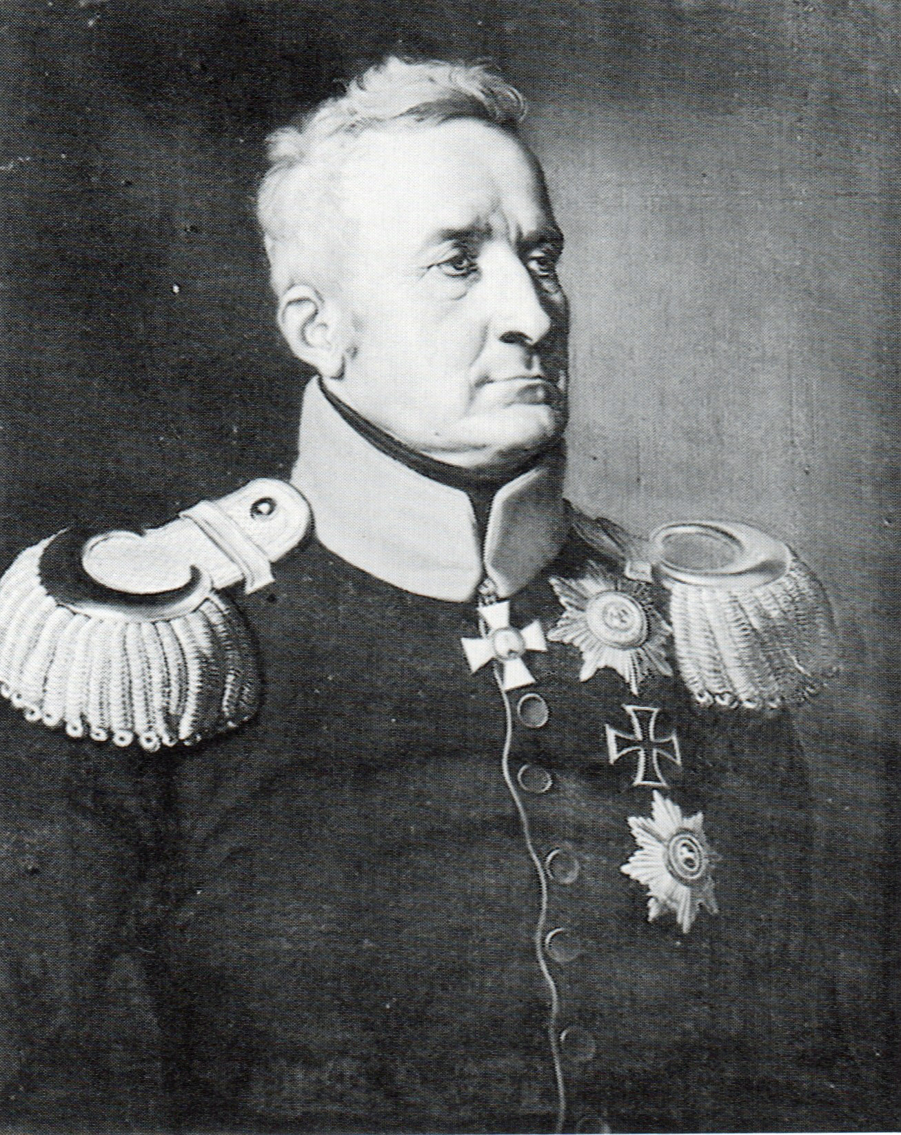 Ölgemälde von Johann Adolph Freiherr von Thielmann, früher im Schloss Königsberg.